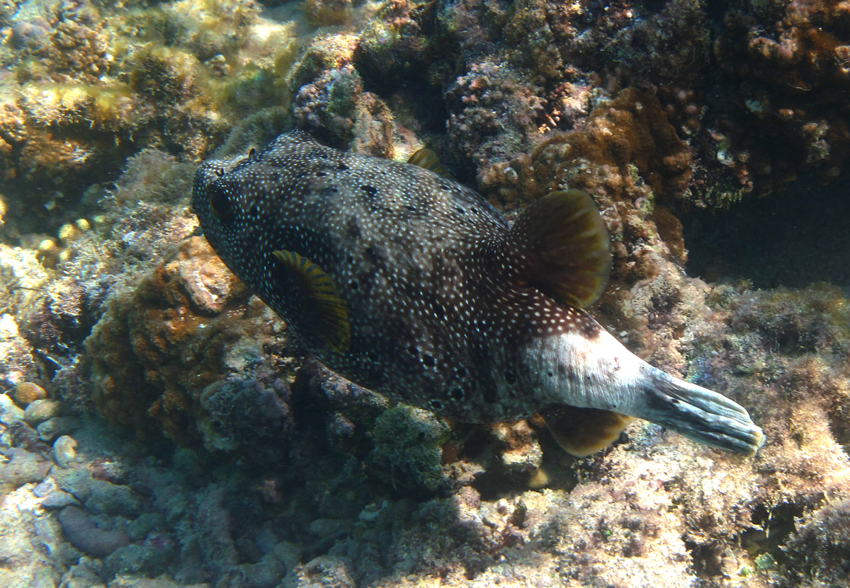 Un hybride A. nigropunctatusxA. meleagris à la Réunion. Voir la publication originale.